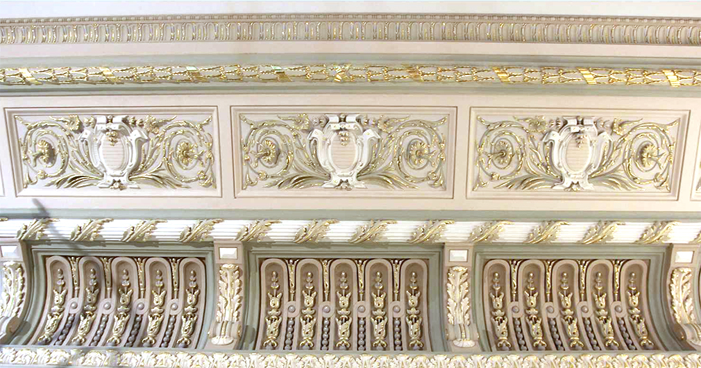 Элемент отделки интерьера особняка фон Рекк после реставрации)